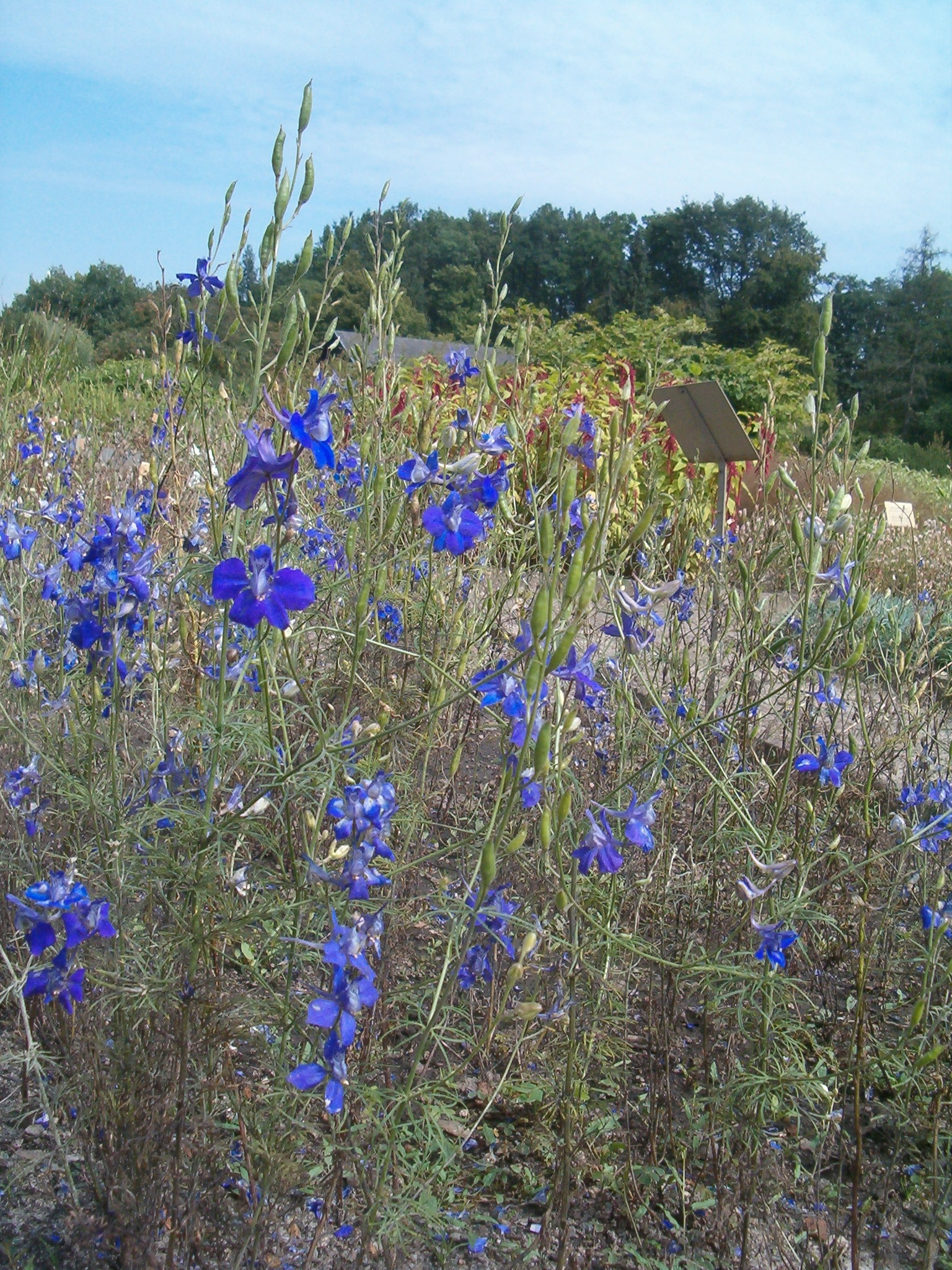 At Botanical Gardens Berlin-Dahlem Species Consolida ajacis